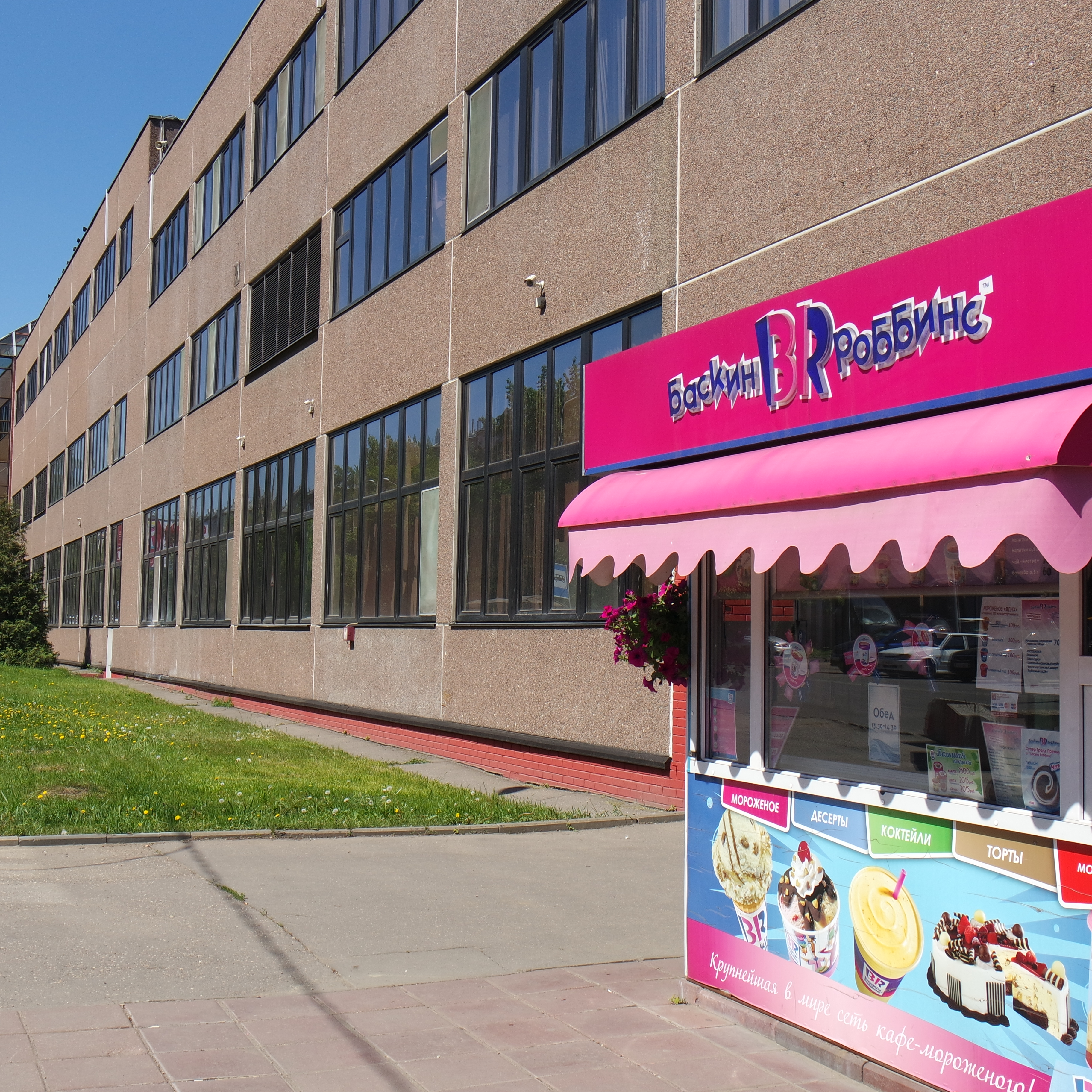 Фабрика мороженного Baskin-Robbins в Москве (бывший Хладокобмнат № 9). Справа — розничный киоск